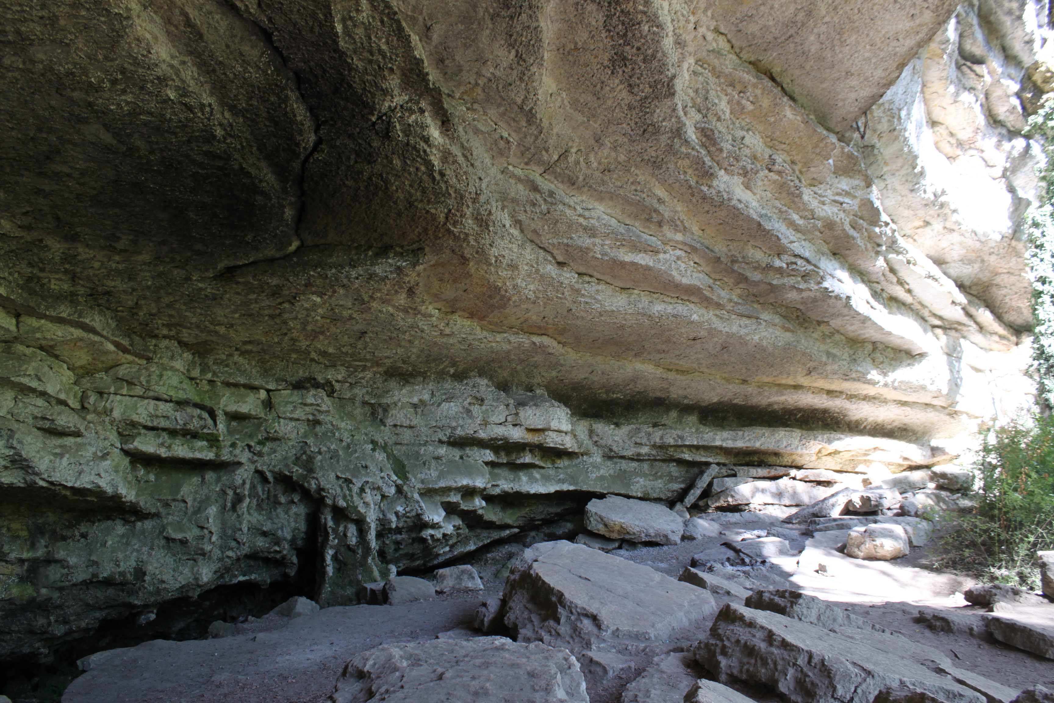 Beaume du Four, abri préhistorique dans les Gorges de l'Areuse sur la commune de Boudry (Canton de Neuchâtel, Suisse)